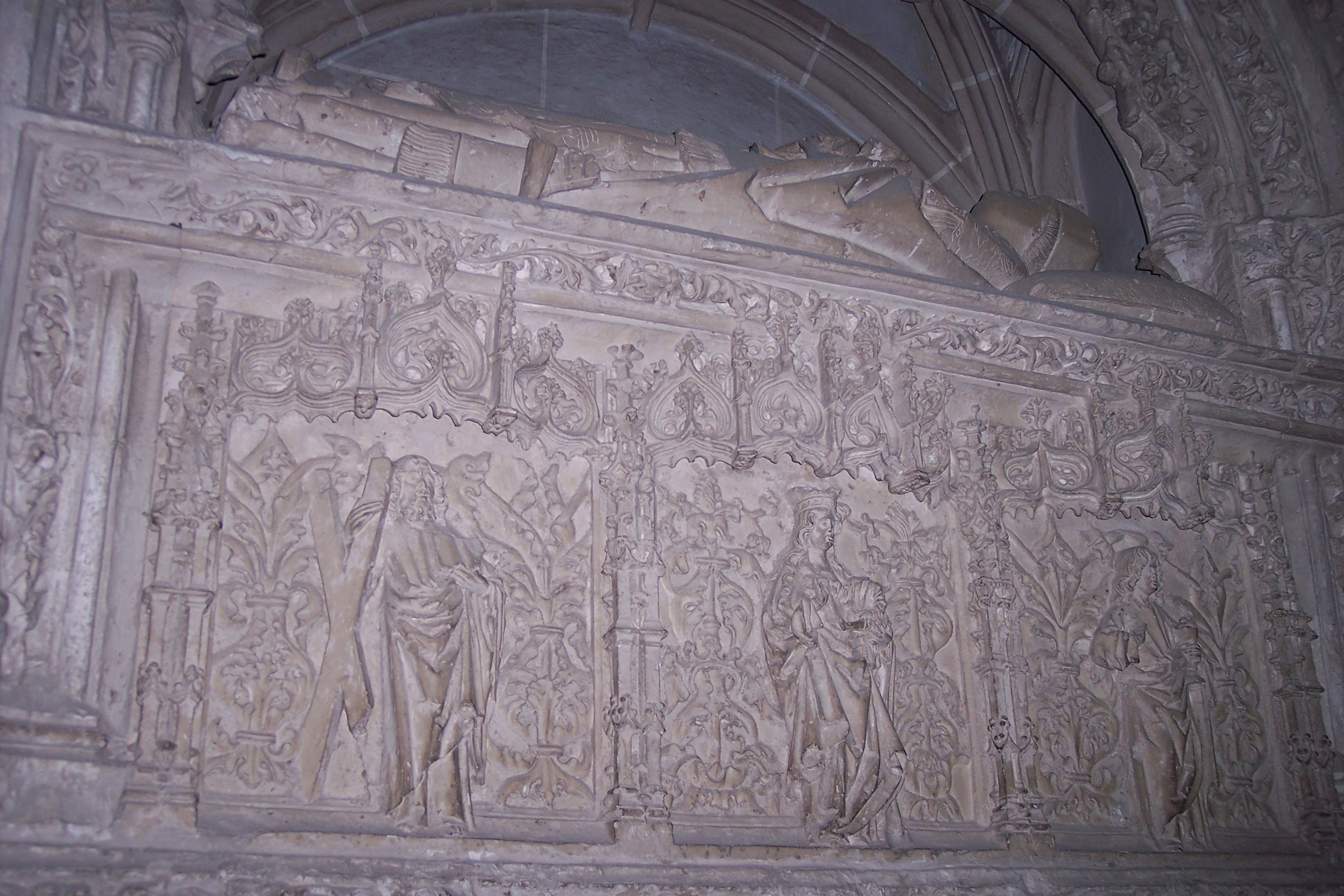 Sepulcro del Abad de Husillos, Don Francisco Núñez. Obra de Alejo de Vahía. 1501. Catedral de Palencia, España.